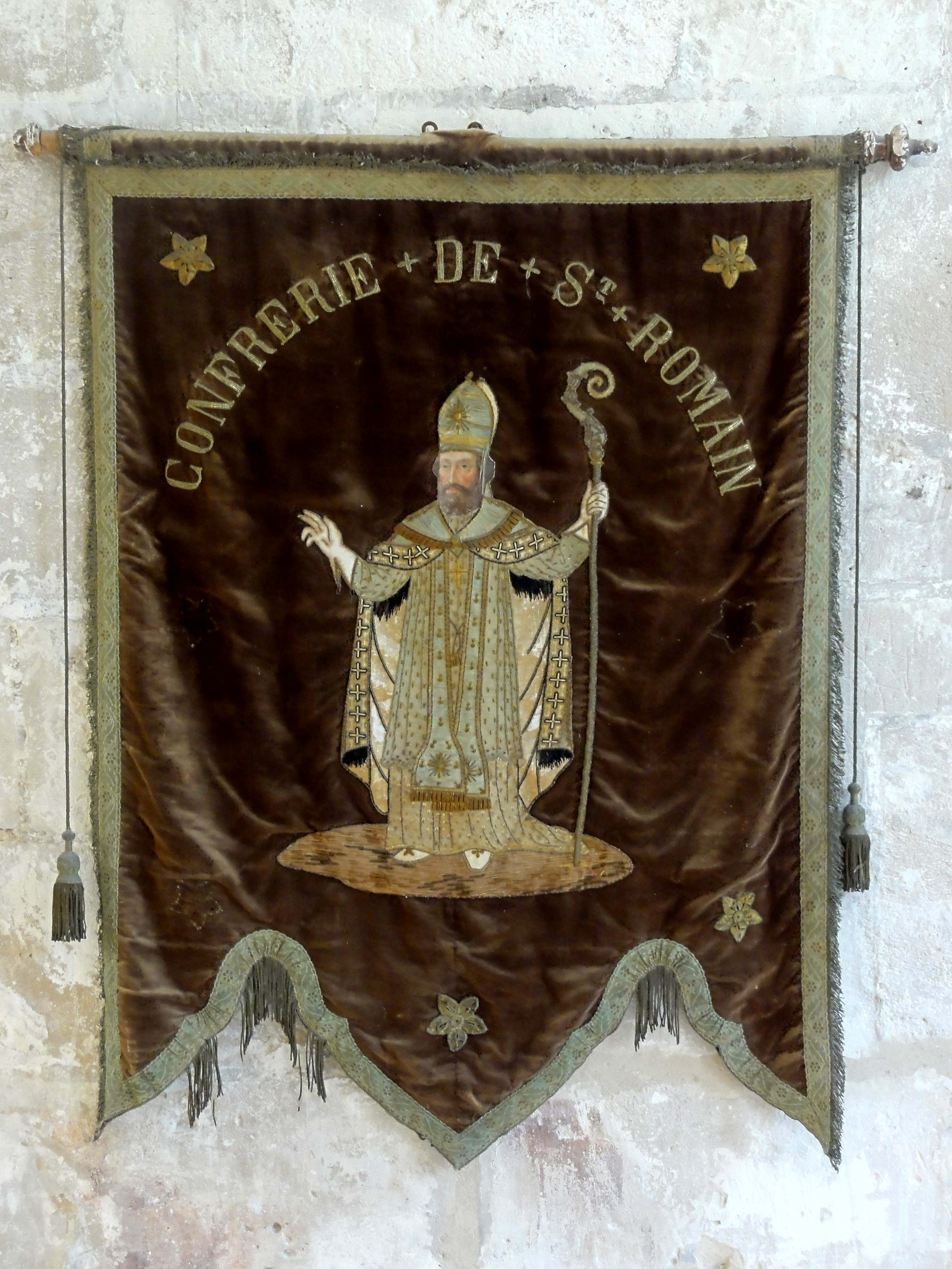 Mobilier de l'église (voir titre).